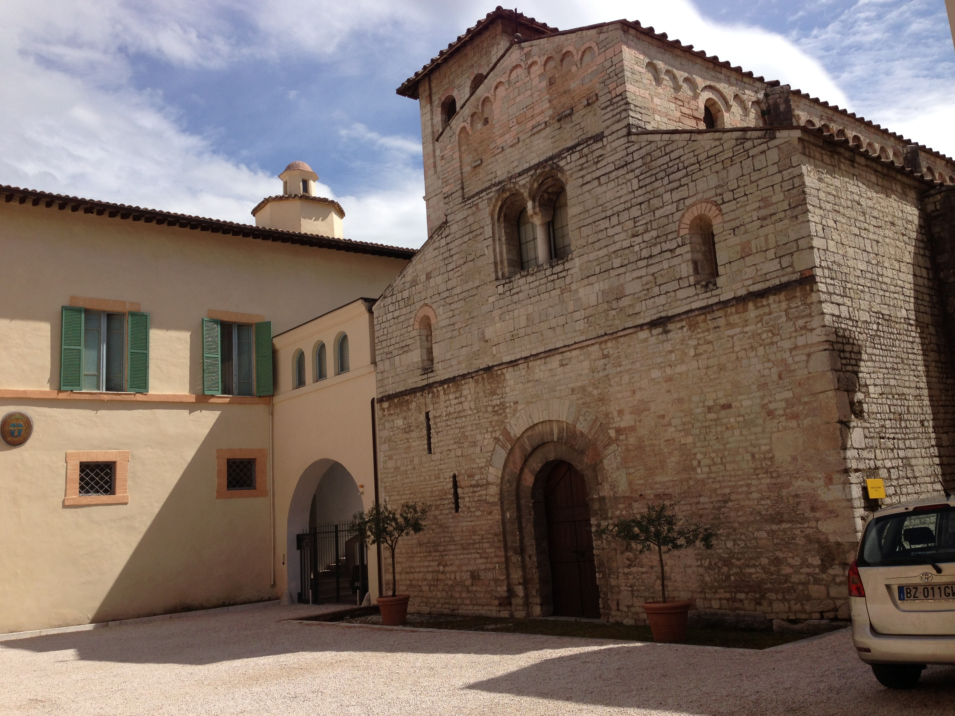 Chiesa di Sant'Eufemia. Spoleto